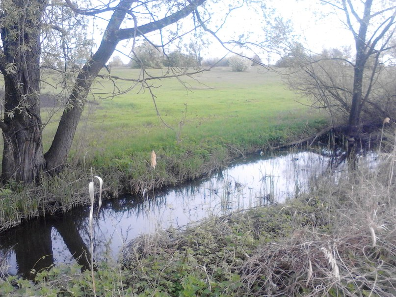 река Макарик (Макарий Колодезь) в с.Макарье